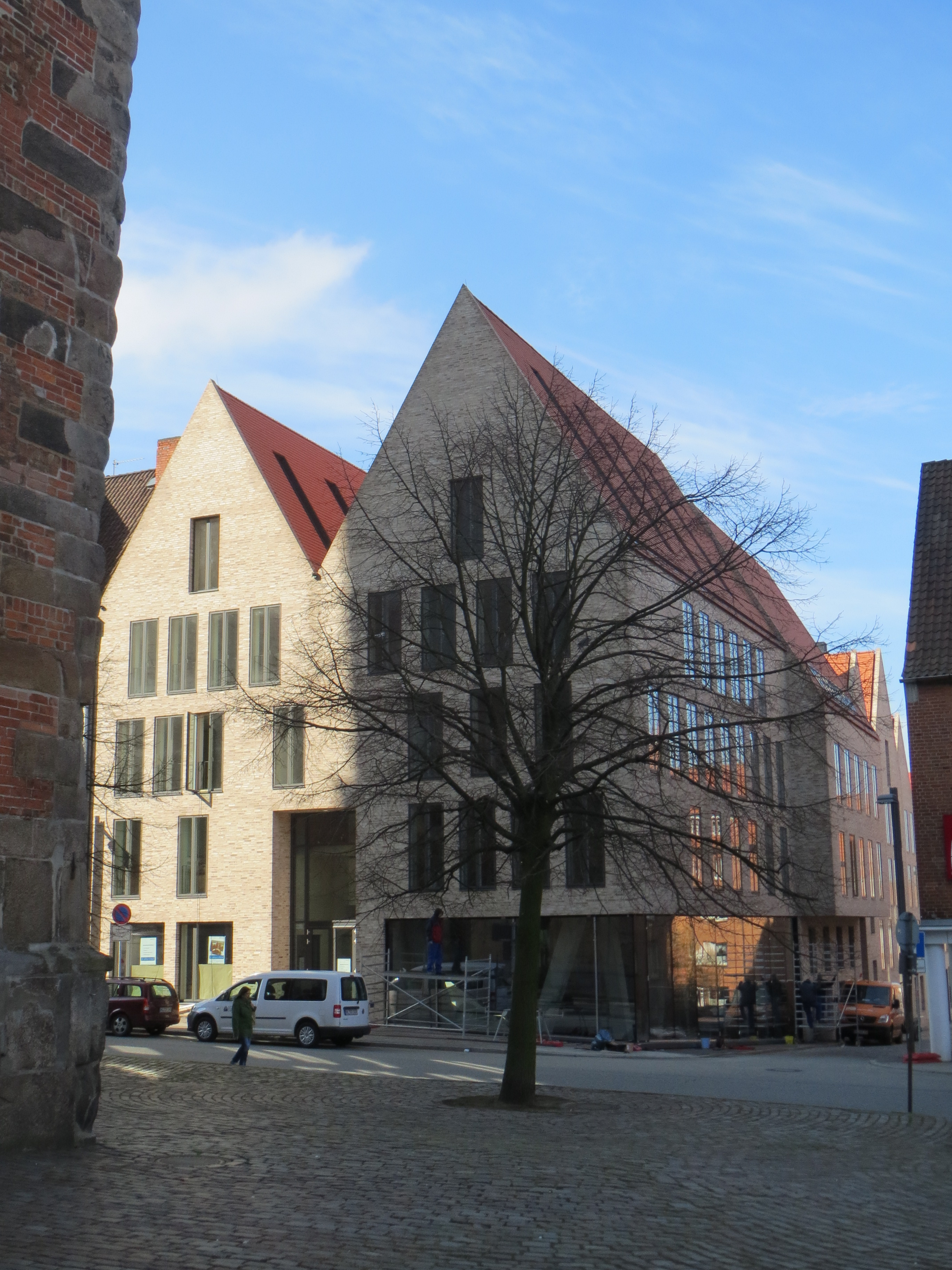 Ulrich-Gabler-Haus, Schüsselbuden 6-8 in Lübeck mit ausgegrabenen Kellerresten aus dem 13. Jahrhundert